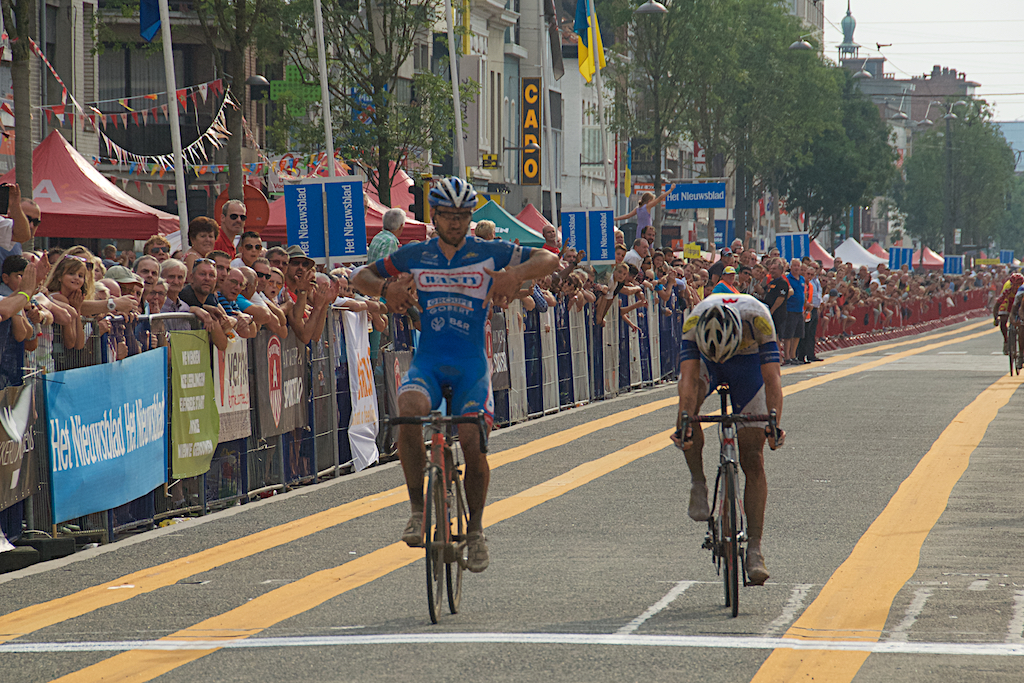 Stenuit wint